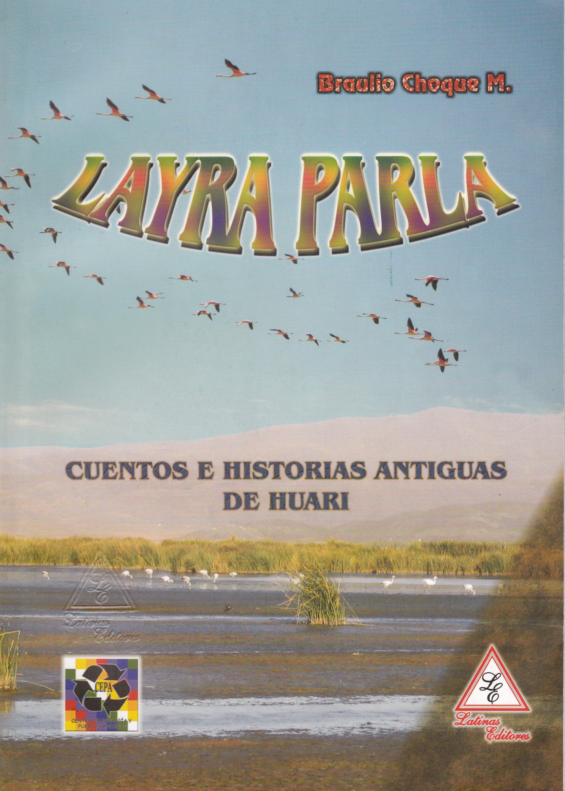 Portada del Libro "Layra parla, cuentos e historias antiguas de Huari" CEPA, Centro de Ecología y Pueblos Andinos, Latinas Editores.Oruro, Bolivia 2006.ISBN:99954-30-04-5. Del autor Braulio Choque